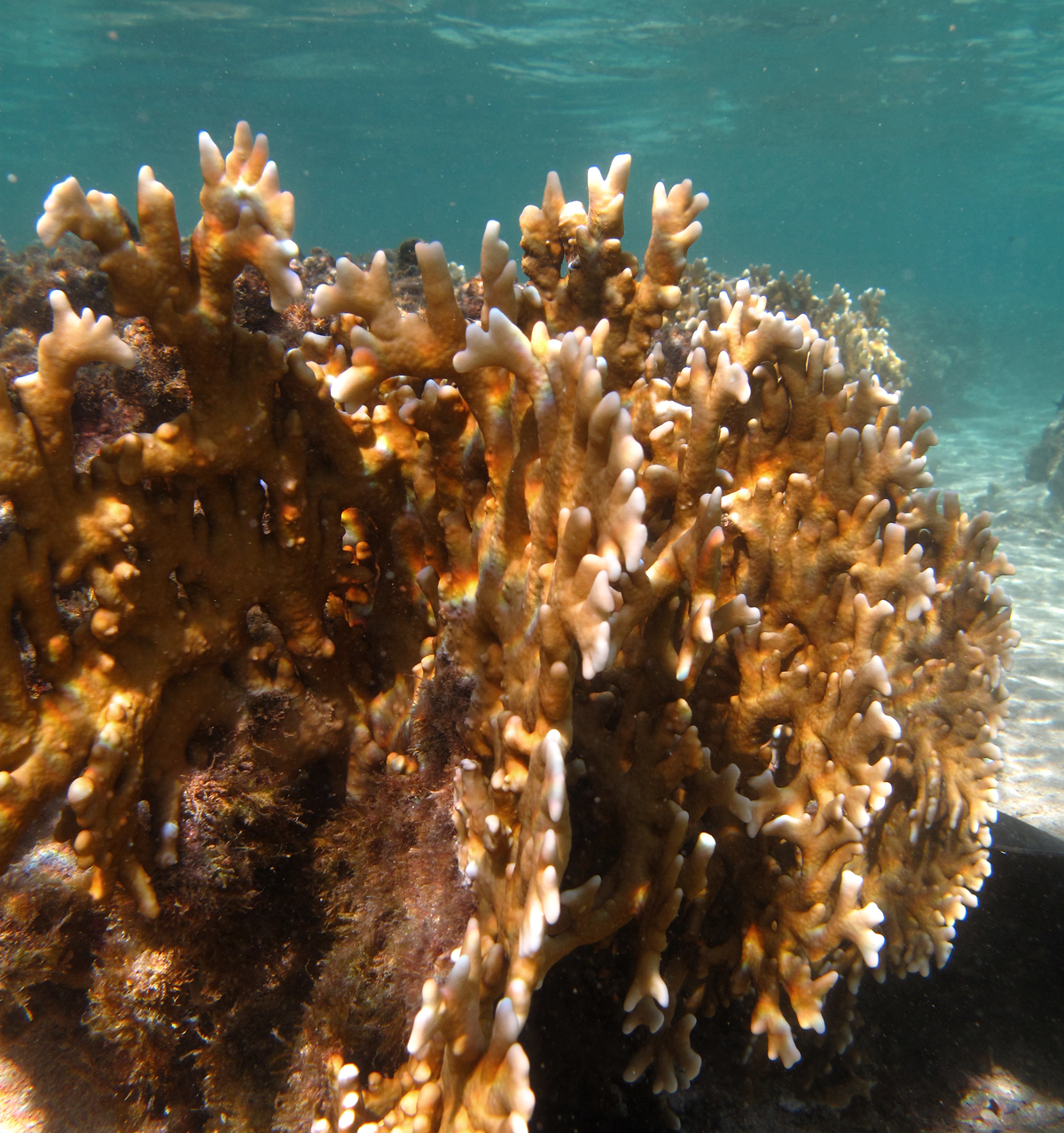 Corail feu (Millepora tenera) à la Réunion.